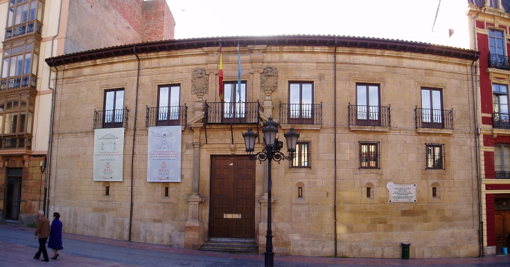 Palacio de los Condes de Toreno o de Malleza-Toreno, en la plaza de Porlier en Oviedo, Principado de Asturias, España.